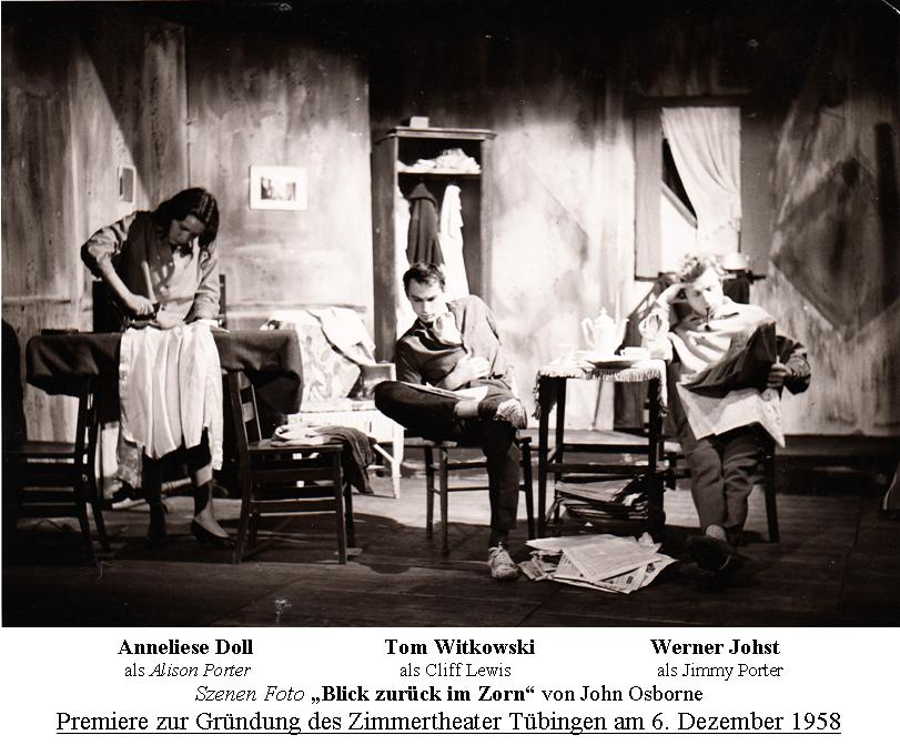 Szenenfoto der Gründungspremiere "Blick zurück im Zorn" von John Osborne im Zimmertheater Tübingen "der Thespiskarren" 6.12.1958